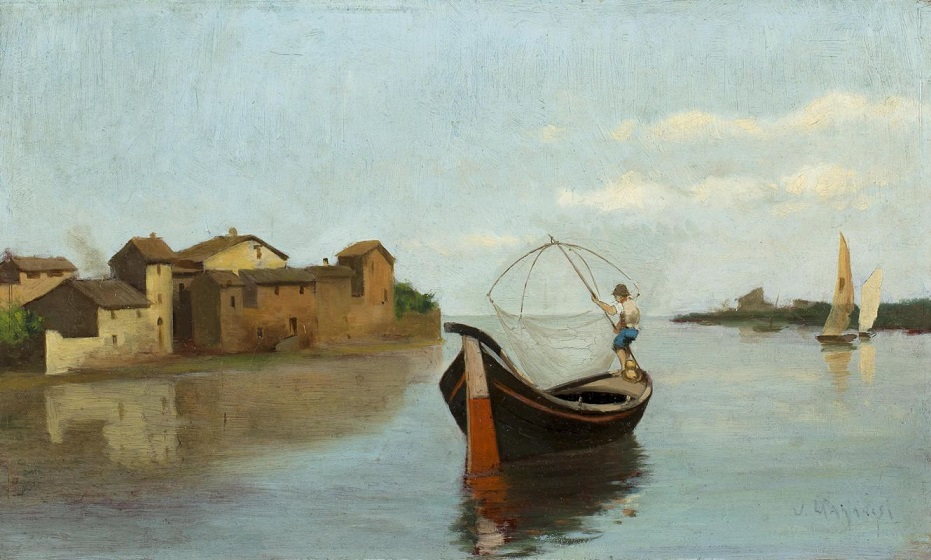 Marina, olio su tavola, 21 x 35.5 cm., firmato, coll. privata